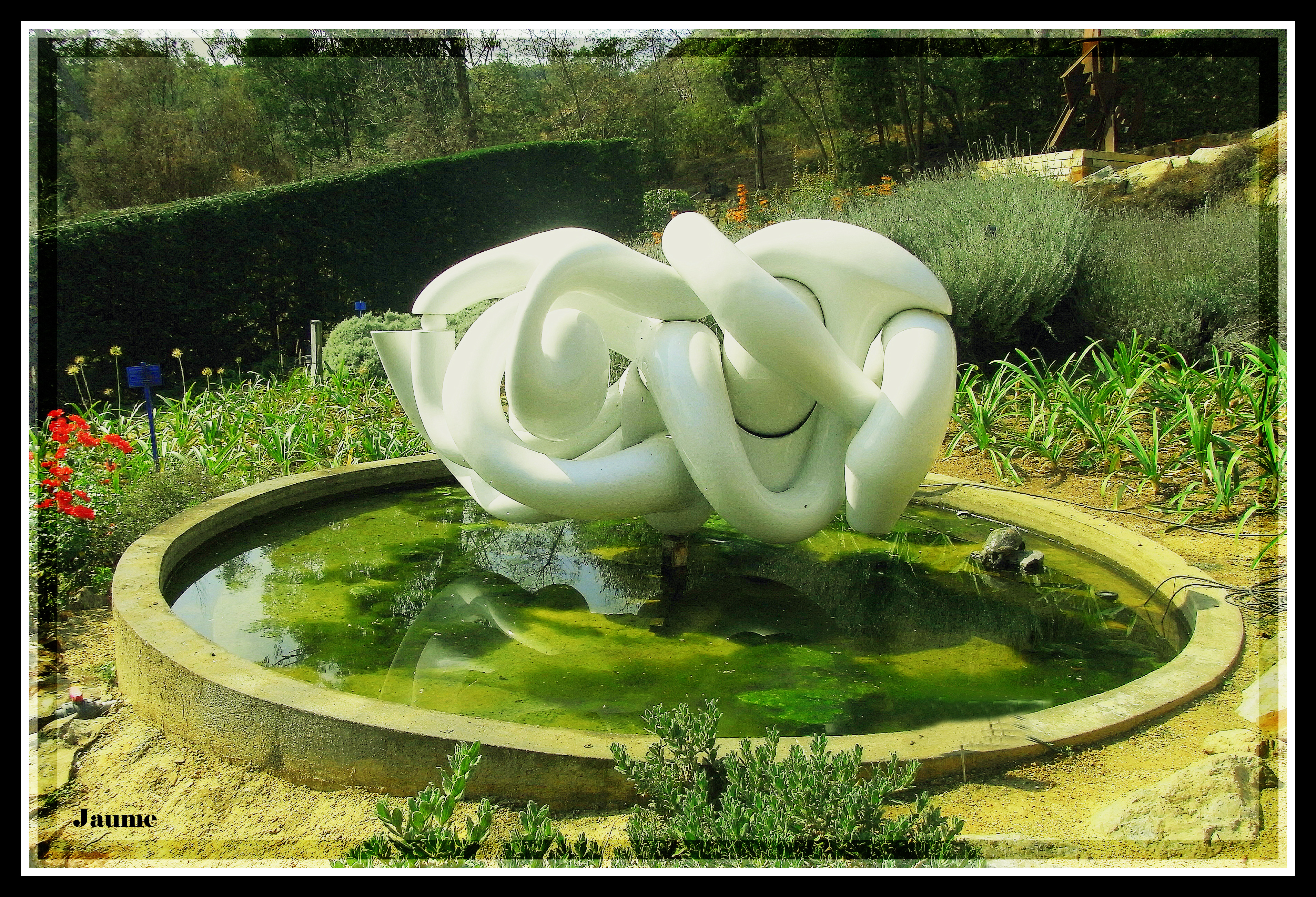 "Aquesta foto participa al grup En un lloc a la Rosa dels Vents. Per endevinar el lloc de la fotografia, resgistra't primer, sisplau On està aquesta escultura ? CALELLA de PALAFRUGELL - Jardins de Cap Roig. Escultura "ALMUDENA" de Miguel Berrocal - Villanueva de Álgaidas (1933-2006) de l´any 1974